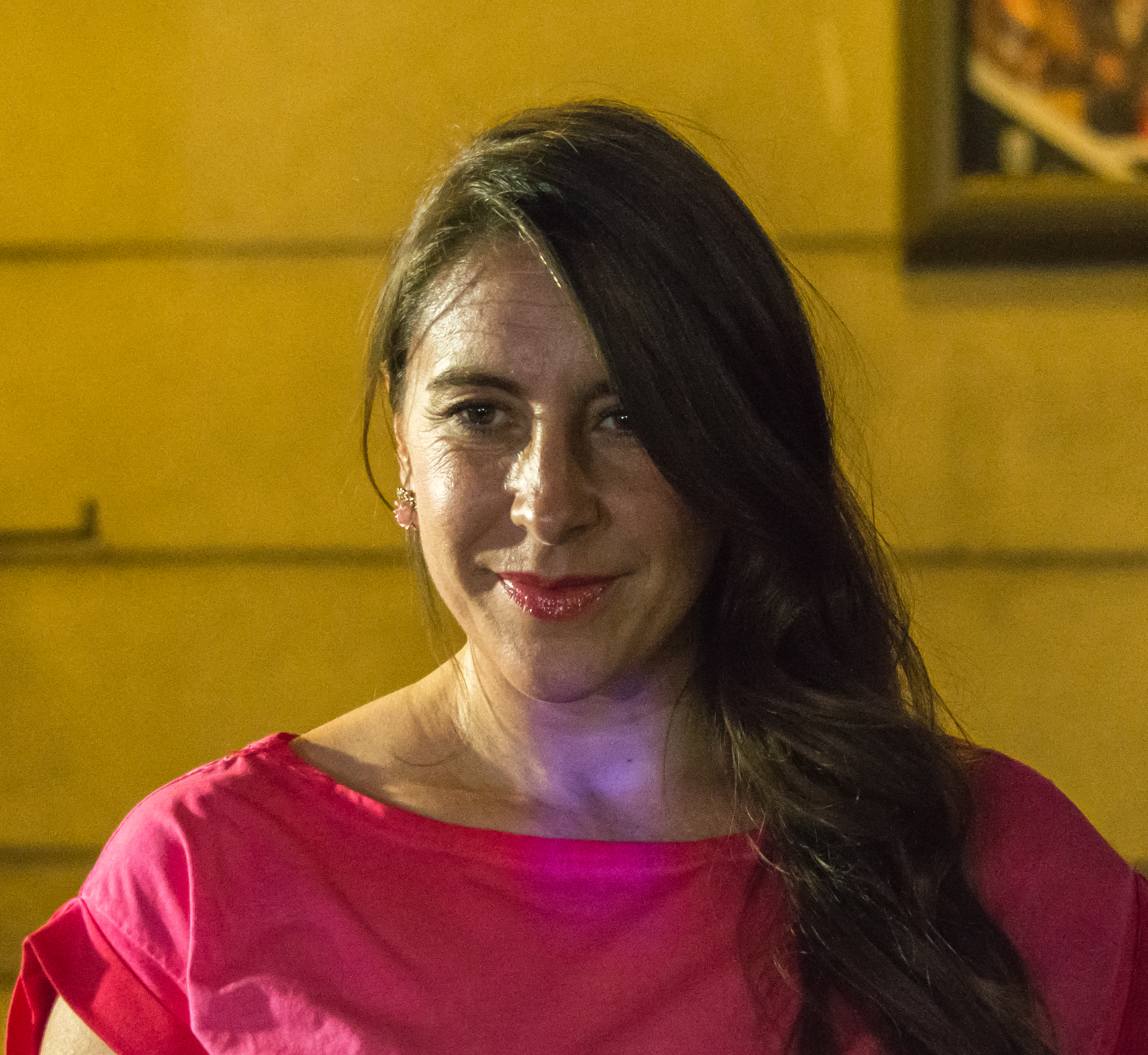 Patricia López, Premios Caleuche, Teatro Oriente, Providencia, Santiago, Región Metropolitana de Santiago, Chile.